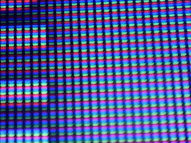 Fotos sacadas con microscopio electronico